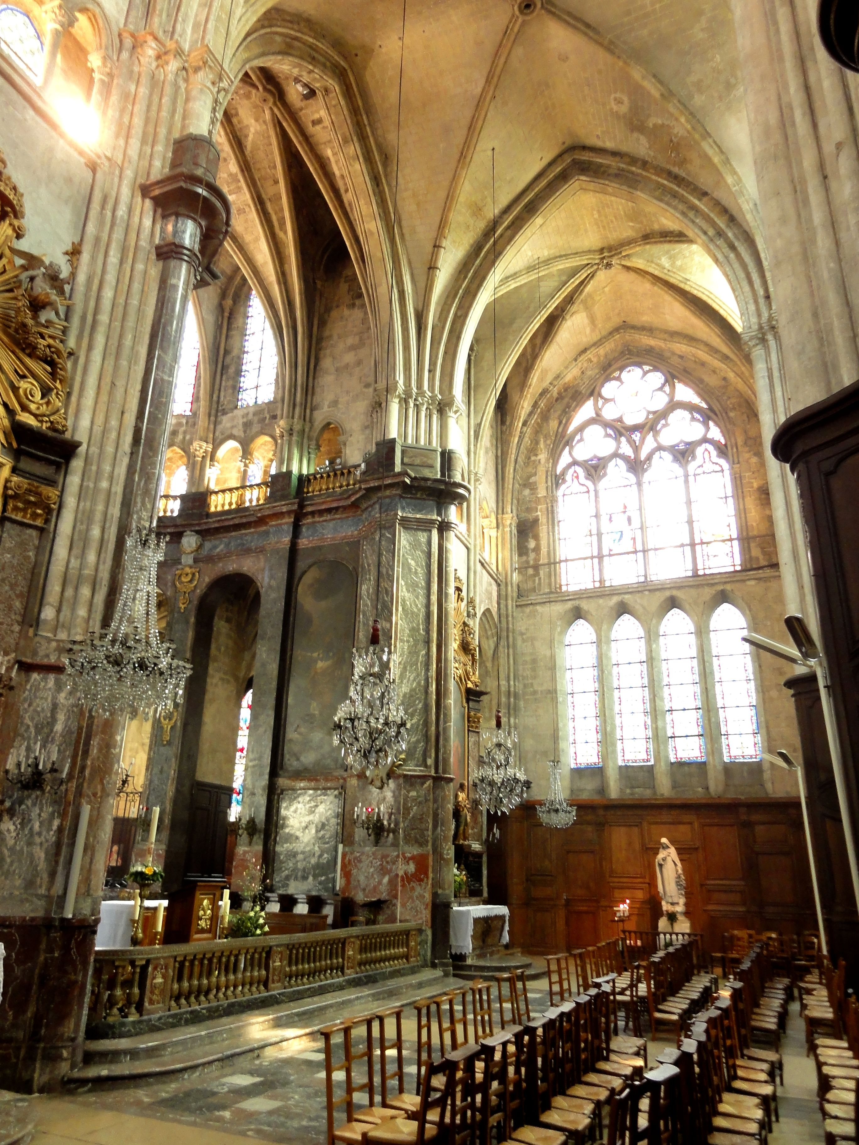 Transept.